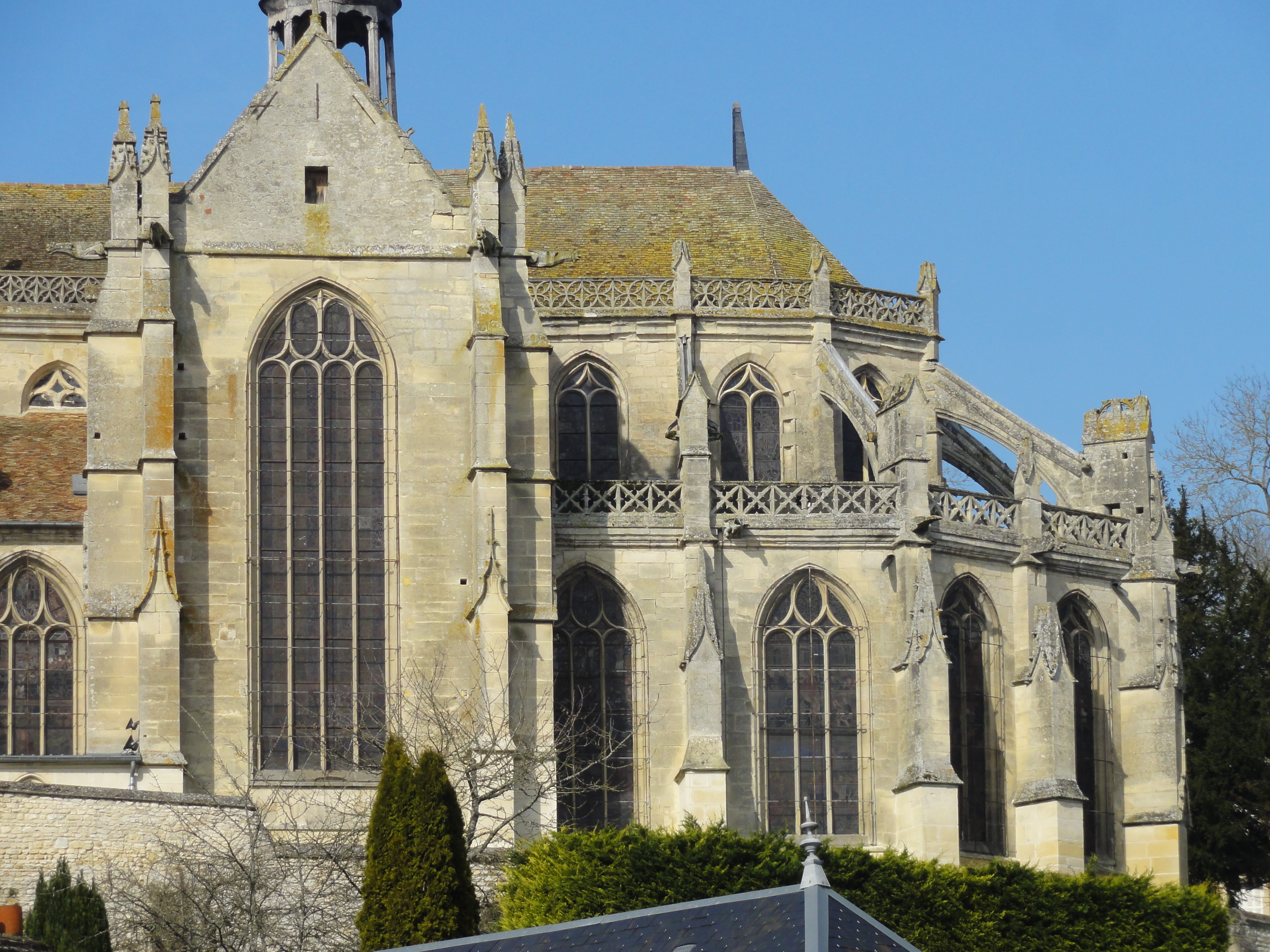 Église Saint-Jean-Baptiste de Chaumont-en-Vexin - voir titre.